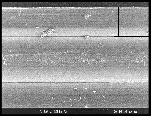 SEM lenticulaire